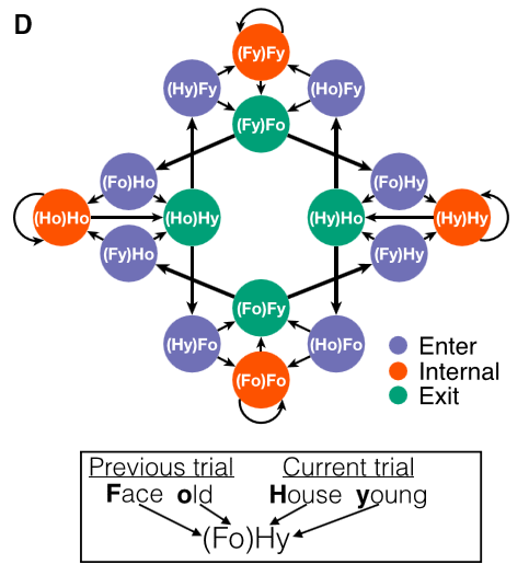 家顔課題における16のステート